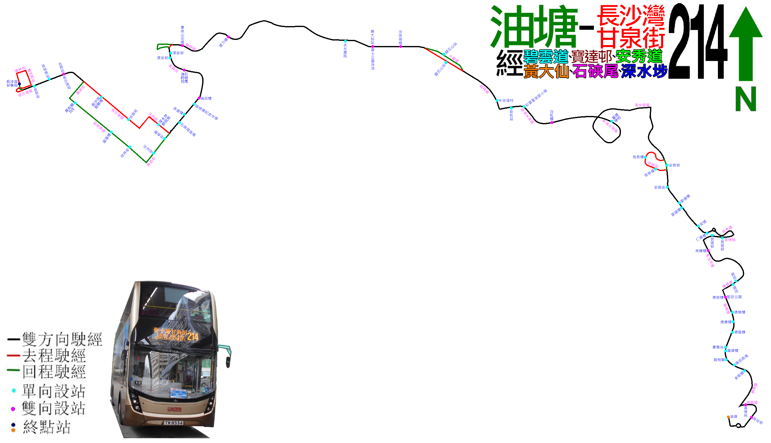 中文（香港）: 九巴214線的走線圖